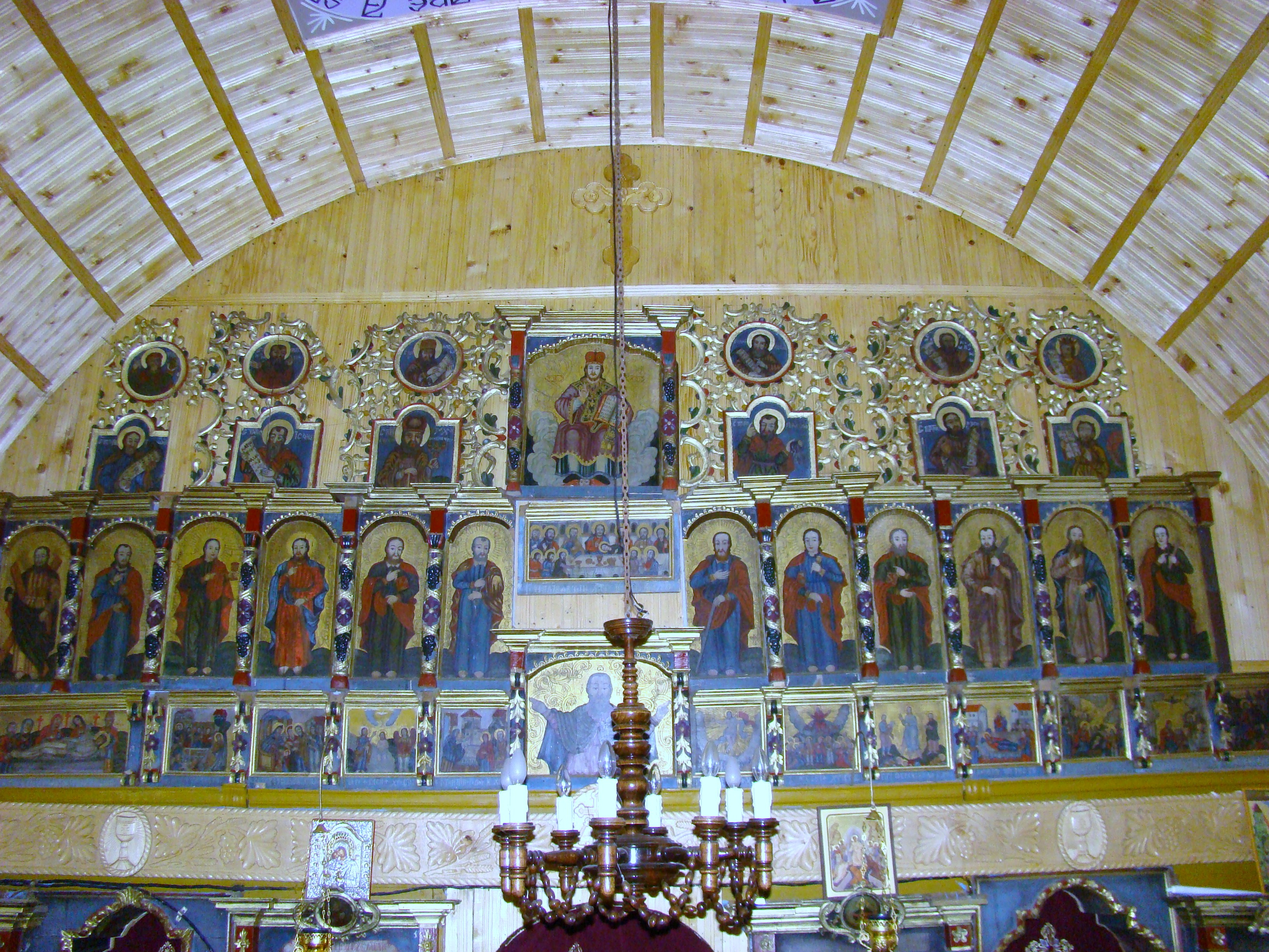 Biserica de lemn "Cuvioasa Paraschiva", sat IZVOARELE; comuna CERNEŞTI